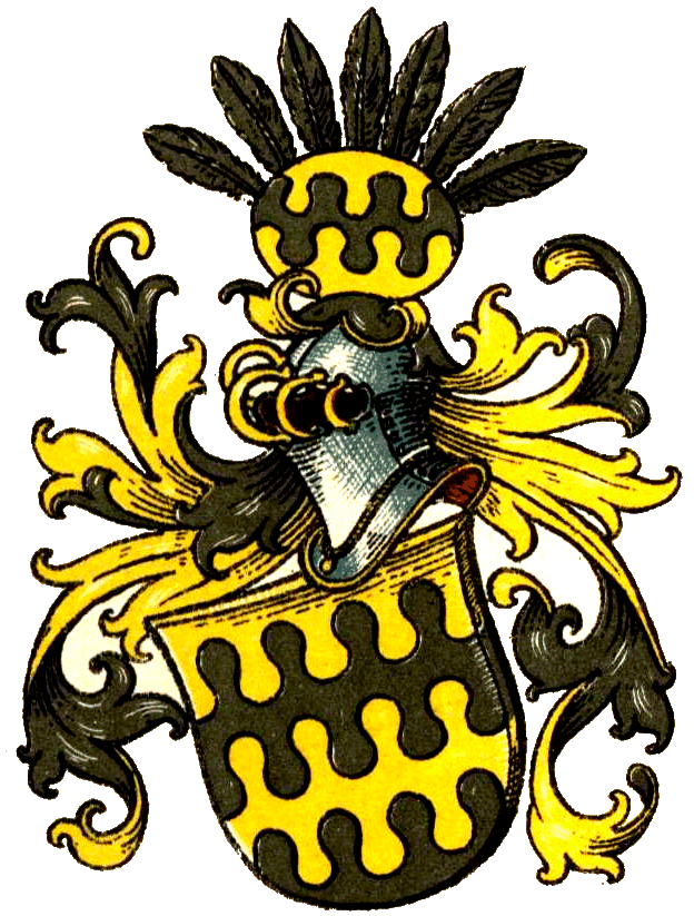 Wappen derer von Budde